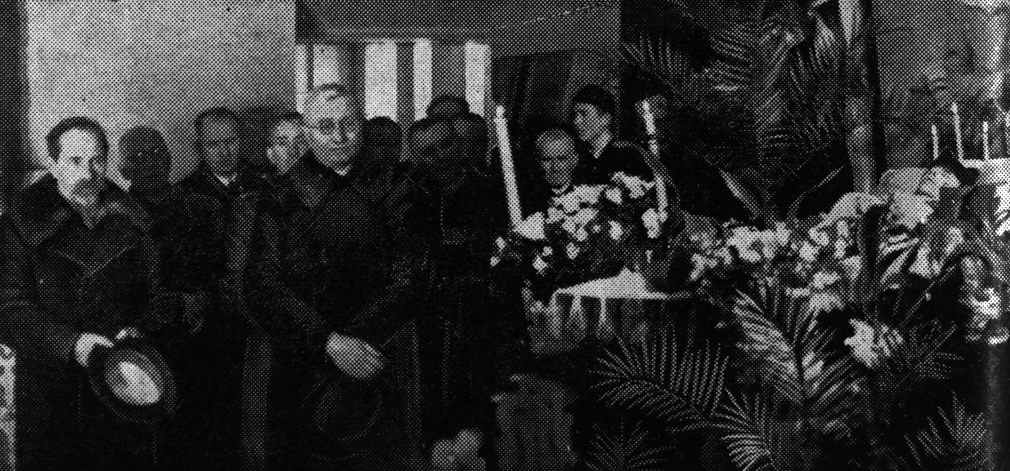 Litova ŝtatprezidanto Antanas Smetona adiaŭas mortintan pastron Dambrauskas.